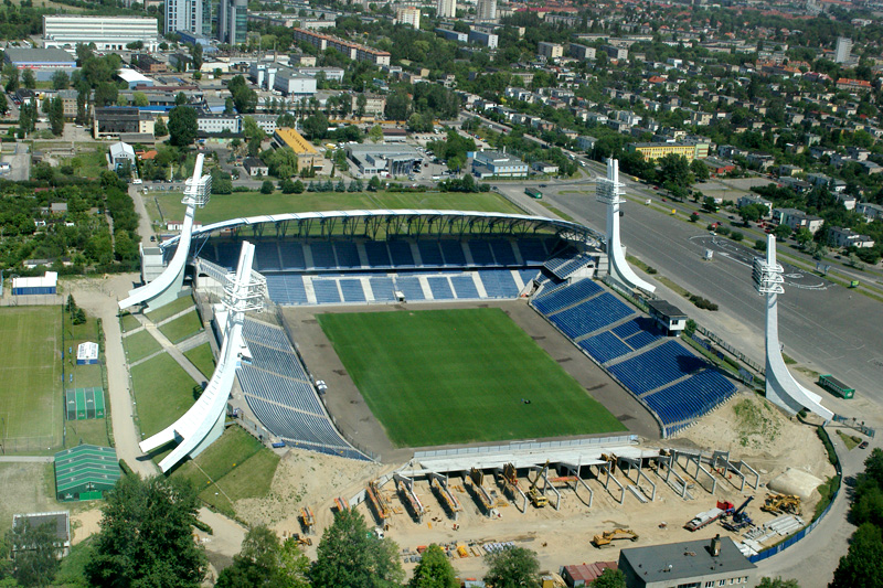 Stadion Lecha, Poznań.